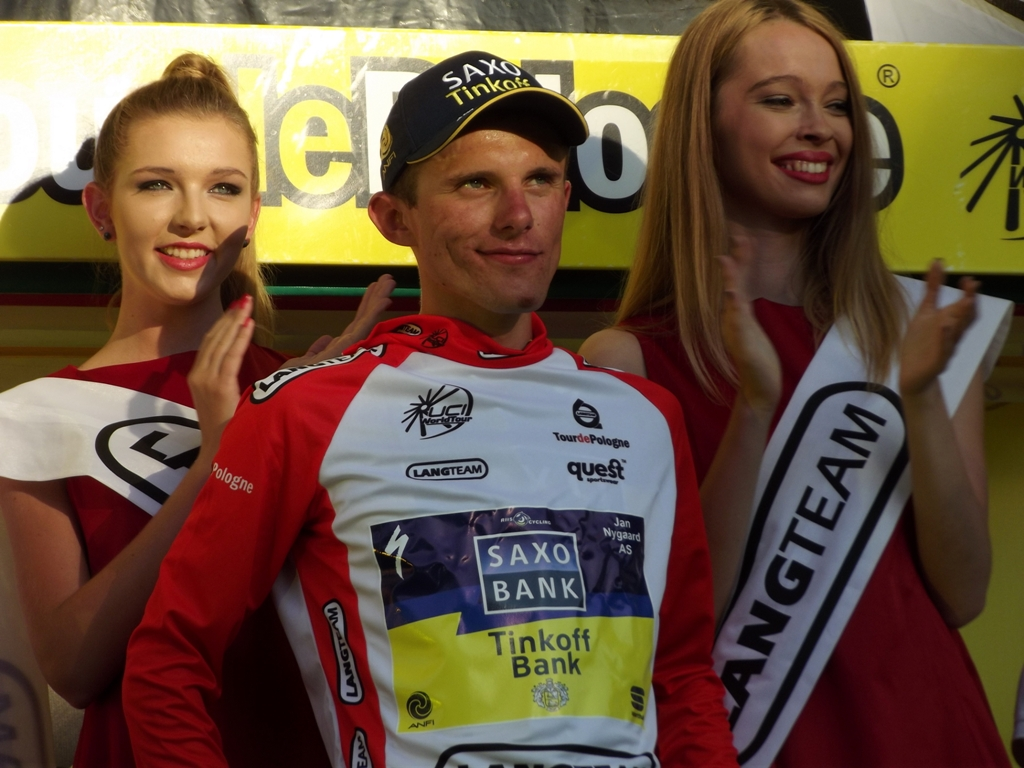 Zdjęcie zrobione podczas VII etapu 70. jubileuszowego Tour de Pologne w Krakowie.